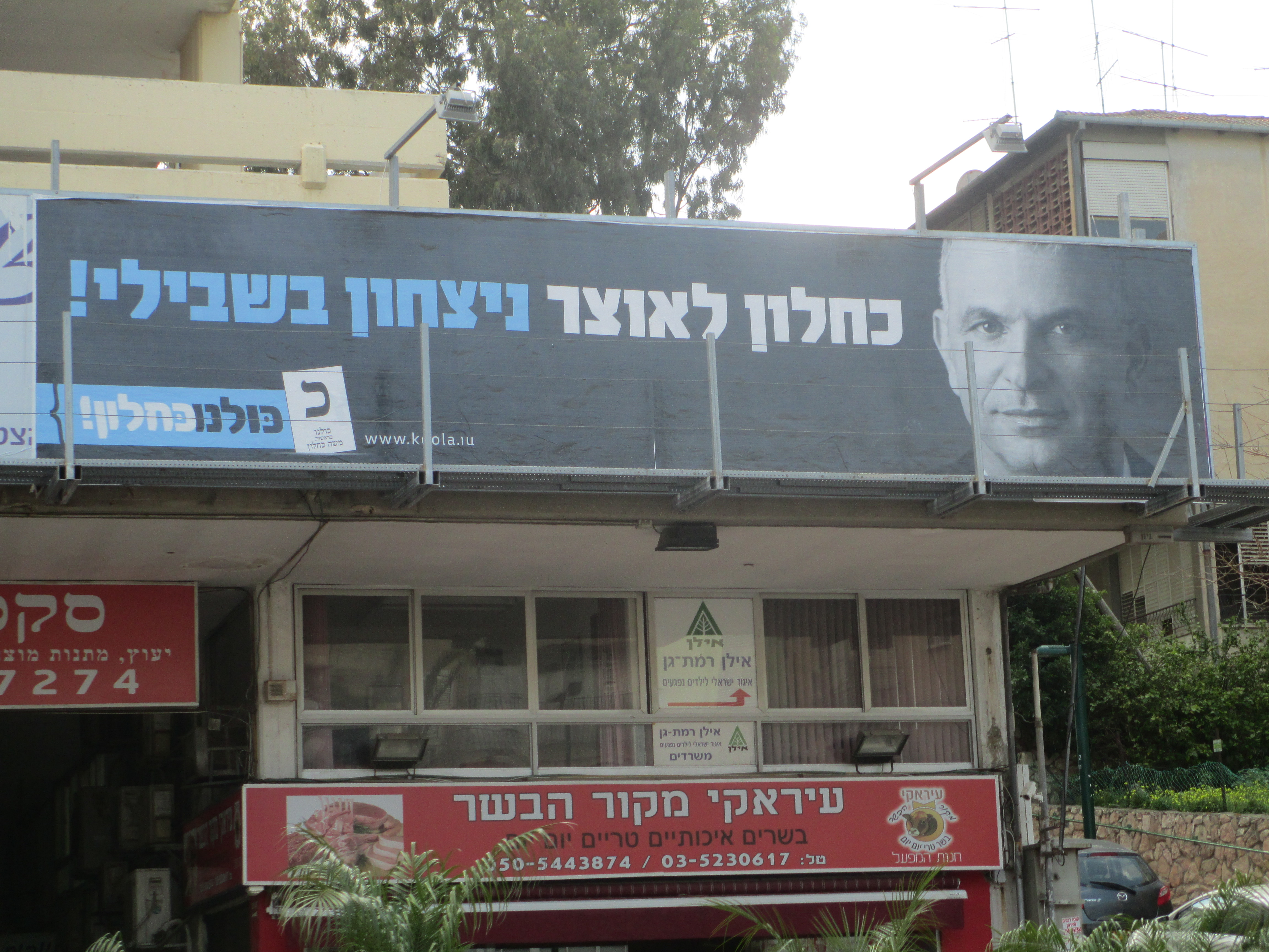 כרזת בחירות של משה כחלון, בחירות 2015